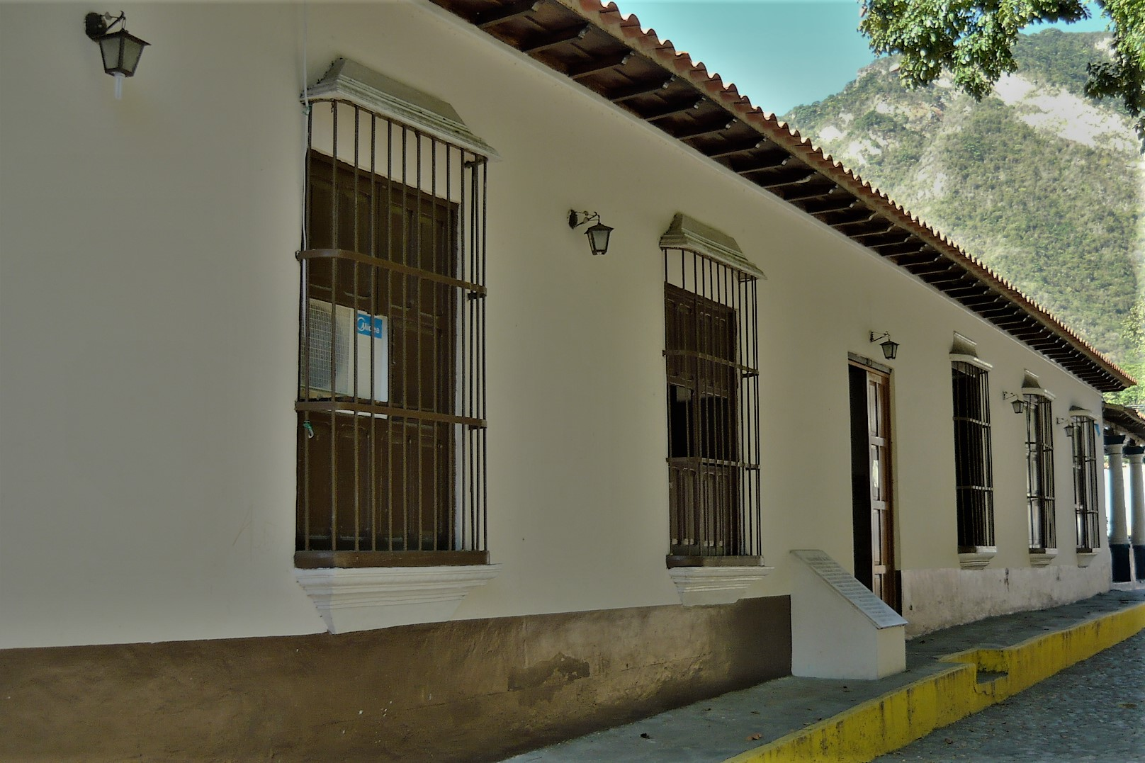 Casa donde funciona la Congregación Hermanas Agustinas Recoletas del Corazón de Jesús en la población de Choroni del estado Aragua en Venezuela